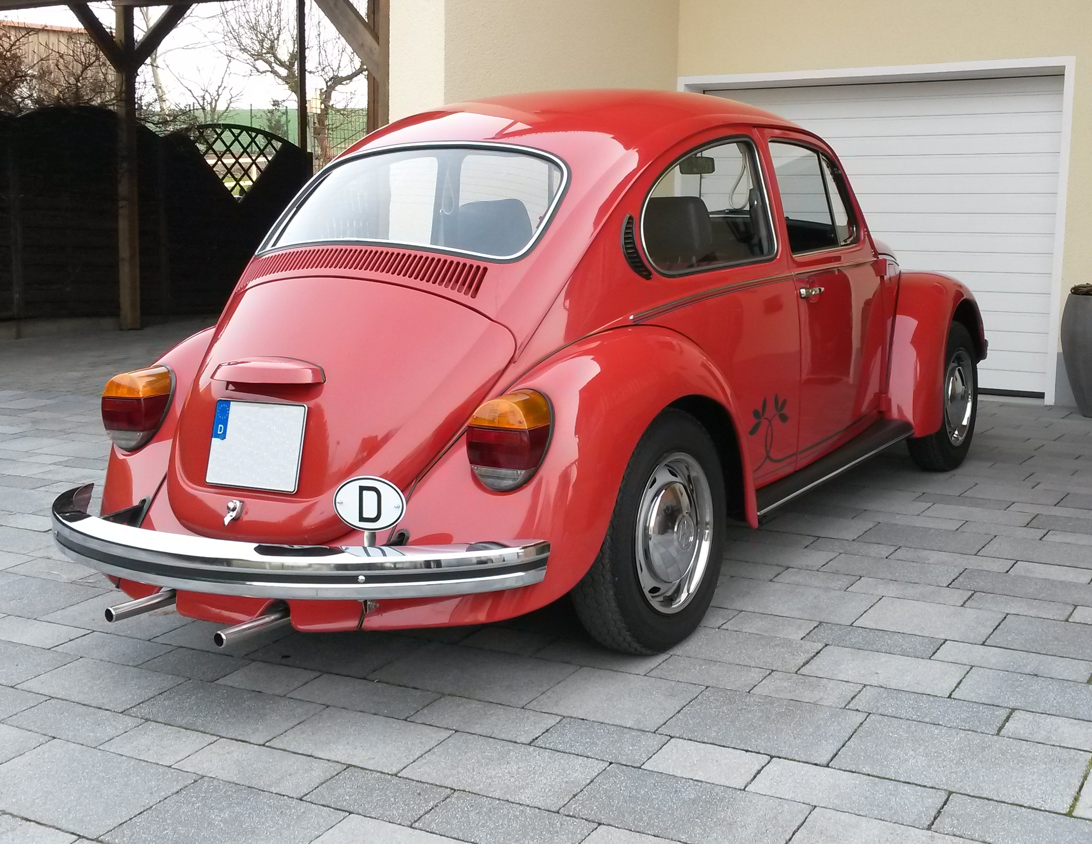 VW Käfer 1200L Sondermodell "Samtroter Sonderkäfer" Bj 1984